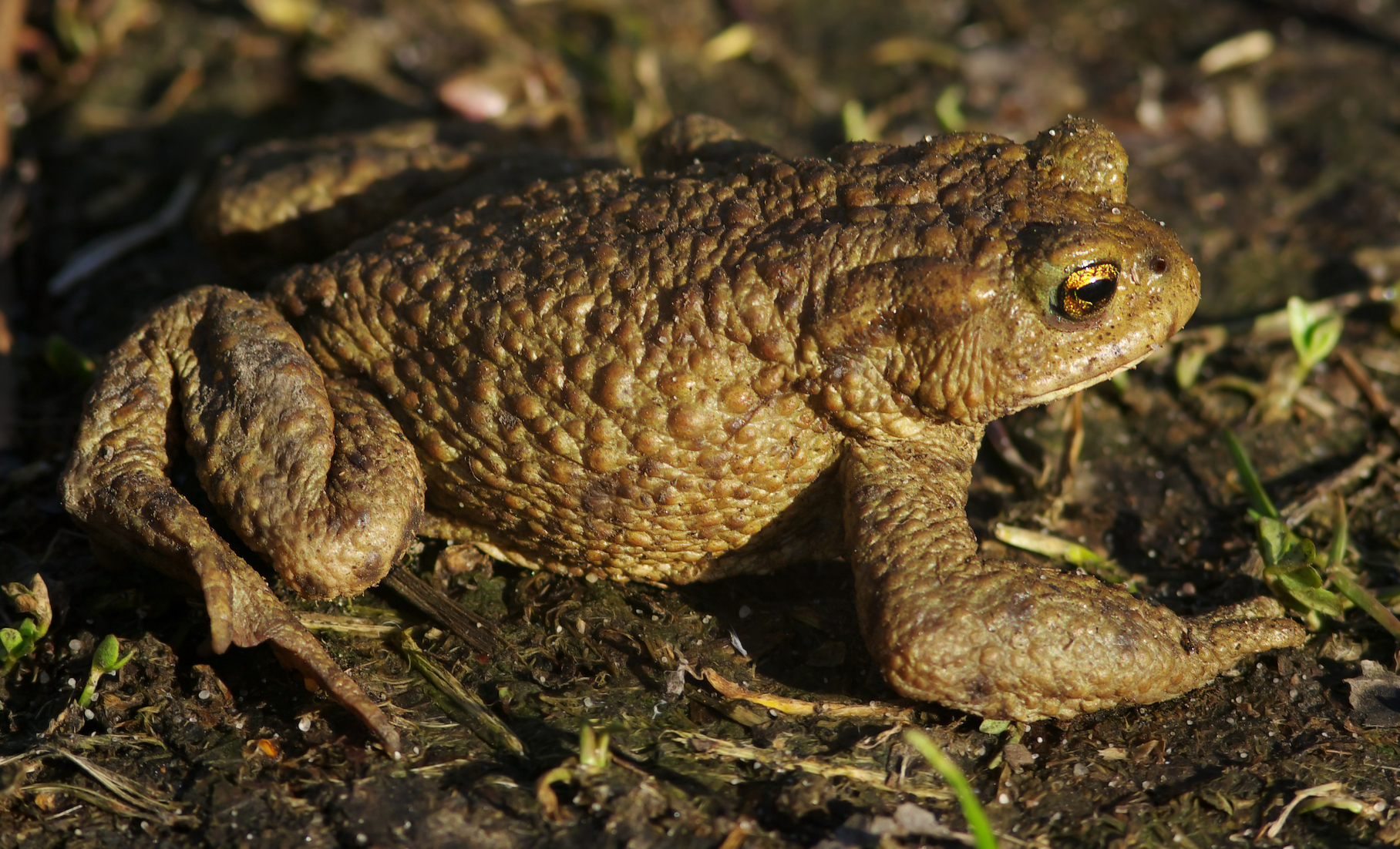 Ropucha szara profil